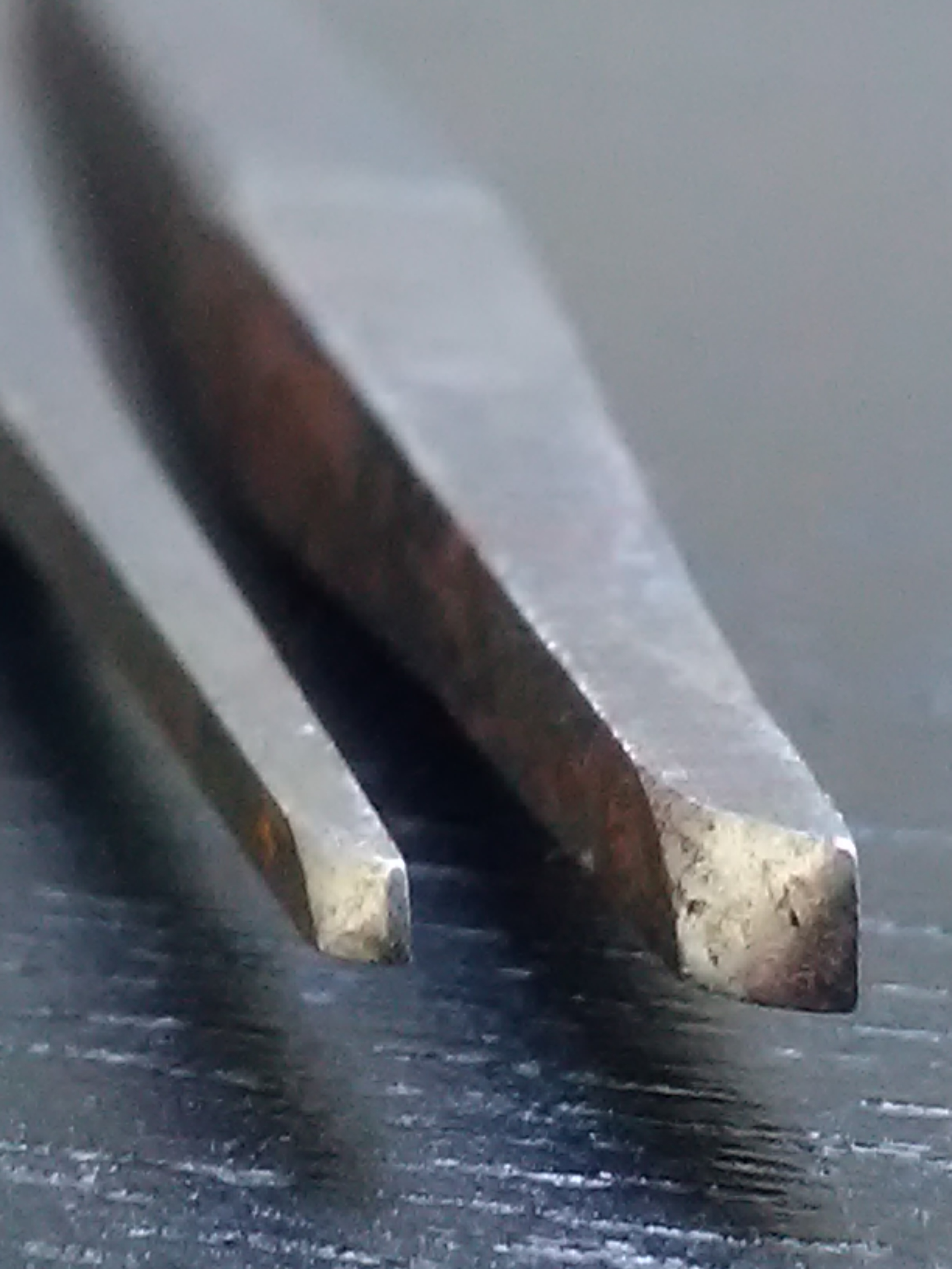 Armando Gorosabel Amuategi grabatzaile eibartarraren gubilen punten detailea.